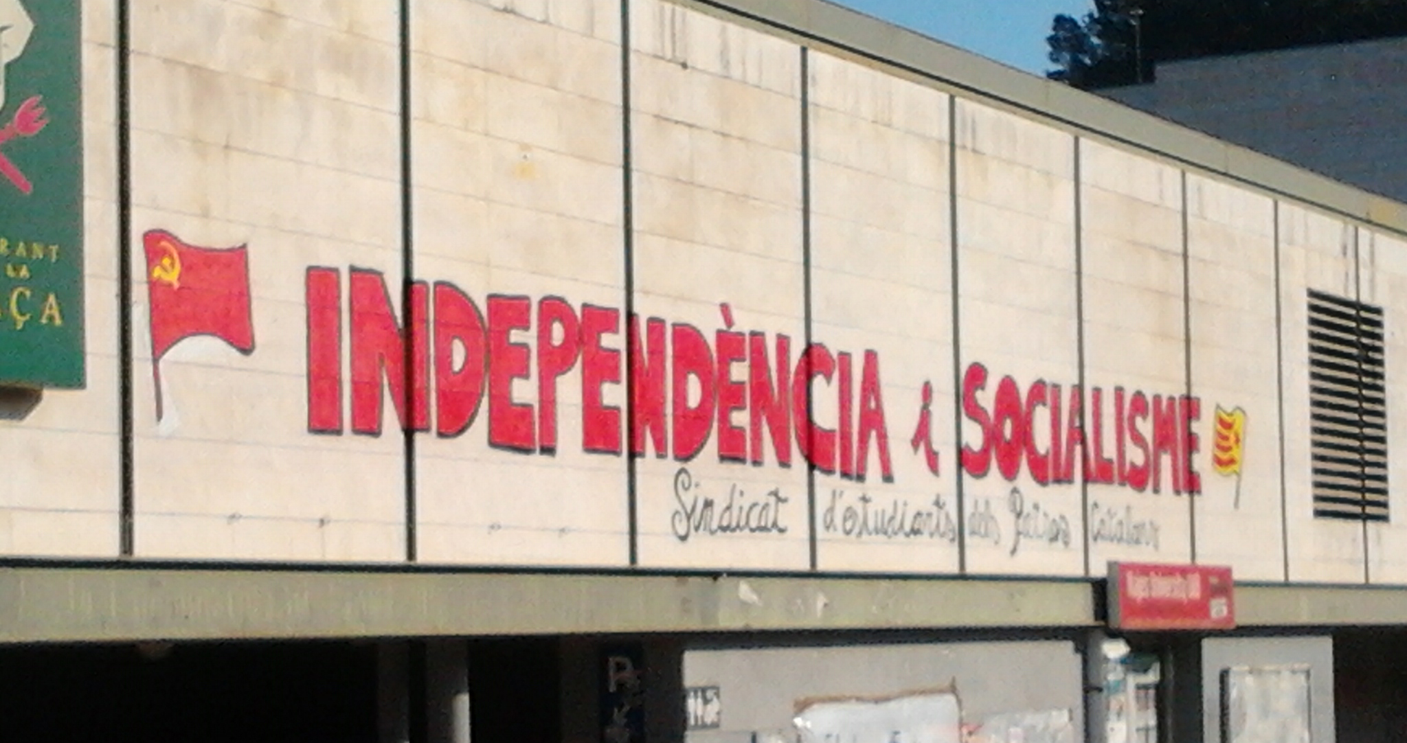 Mural d'apologia a la independència i al socialisme dels Països Catalans, realitzat l'any 2013 pel Sindicat d'Estudiants dels Països Catalans, situat a l'entrada d'accés a la Plaça Cívica del campus de Bellaterra de la Universitat Autònoma de Barcelona des de l'estació d'Universitat Autònoma de Ferrocarrils de la Generalitat de Catalunya